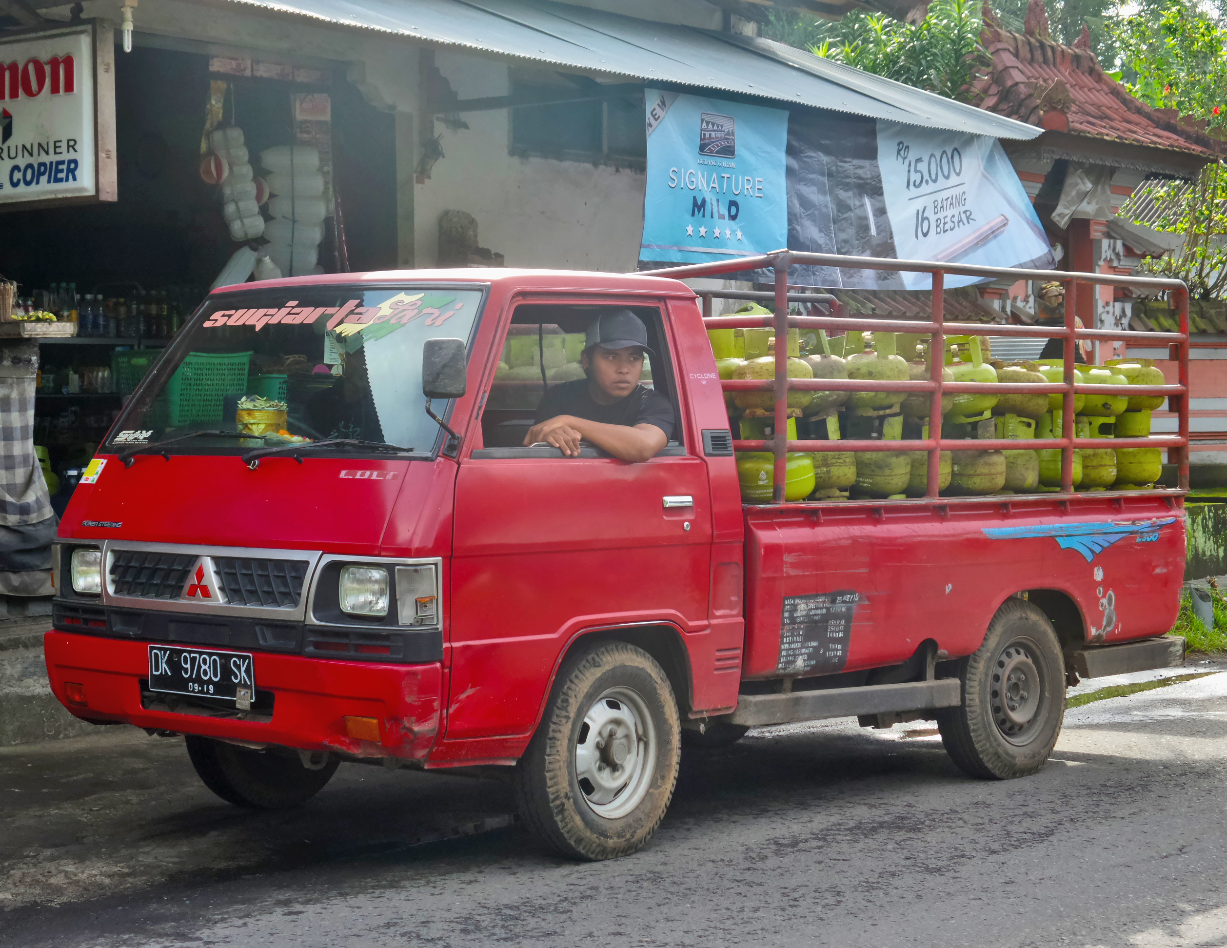 The second-generation Mitsubishi Delica pickup, sold as a Colt L300, carrying 3-kilogram LPG tanks, in Peringsari, Karangasem Regency, Bali, Indonesia. Only in Indonesia the Colt L300 still sold and assembled. Pikap Mitsubishi Colt L300 untuk mengangkut tabung melon Elpiji di Peringsari, Kab. Karangasem.